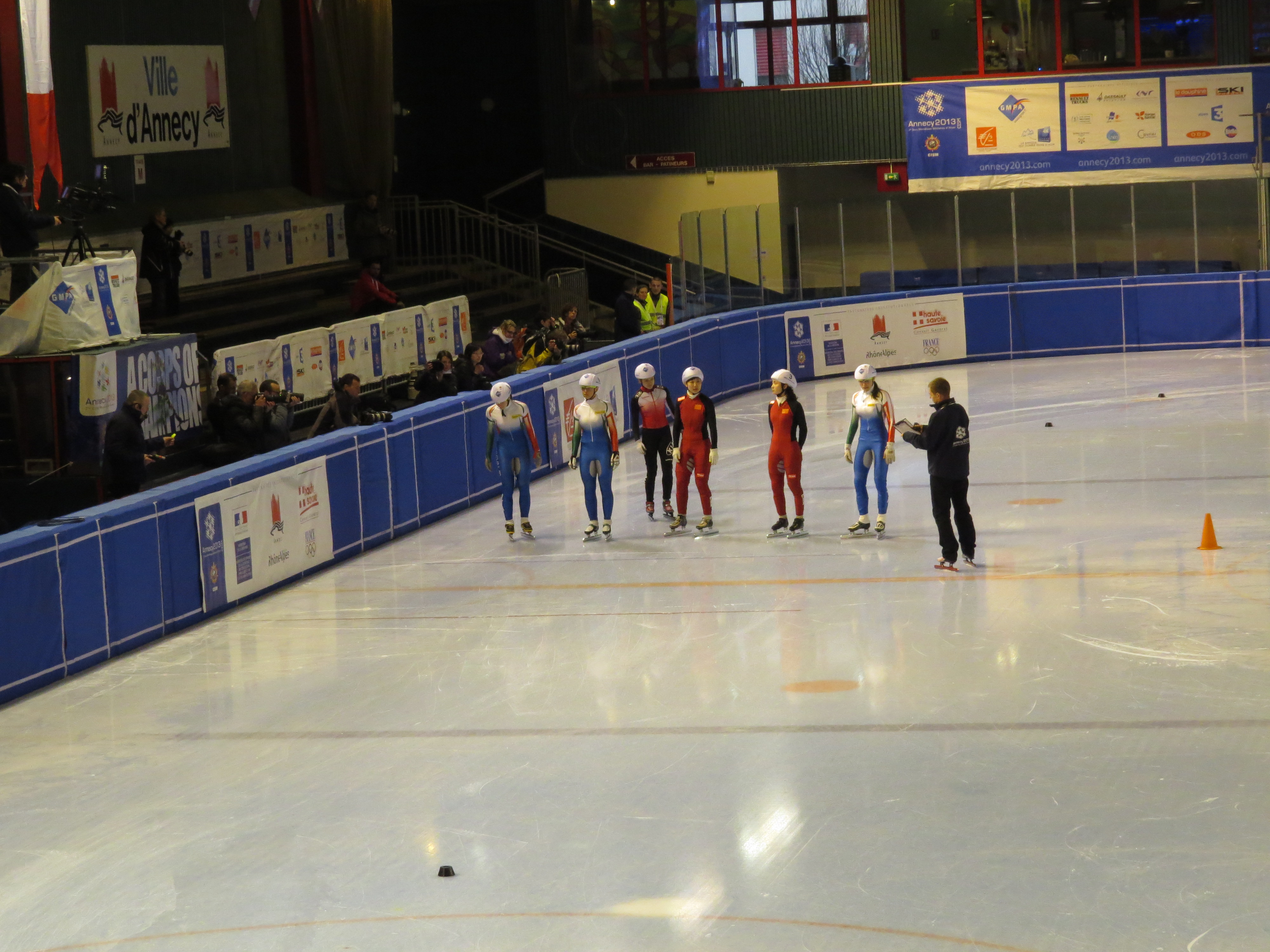 Photo réalisée le 28 mars